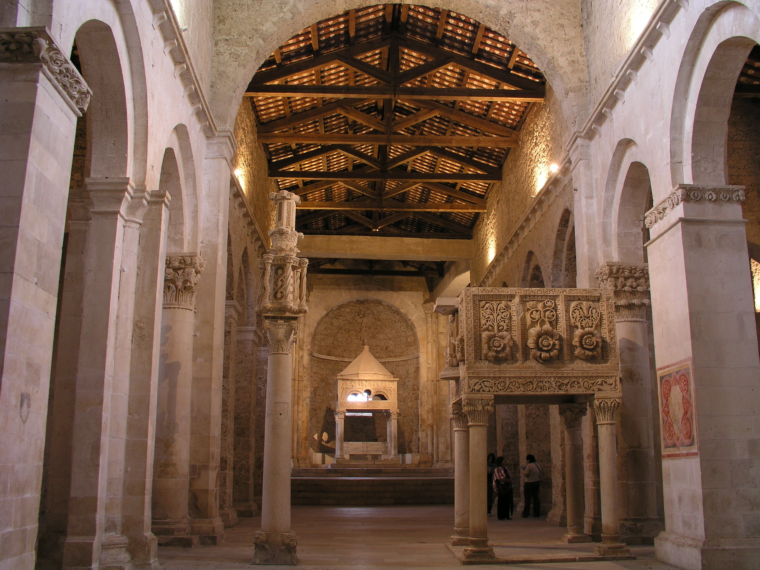 Abbadia di San Clemente